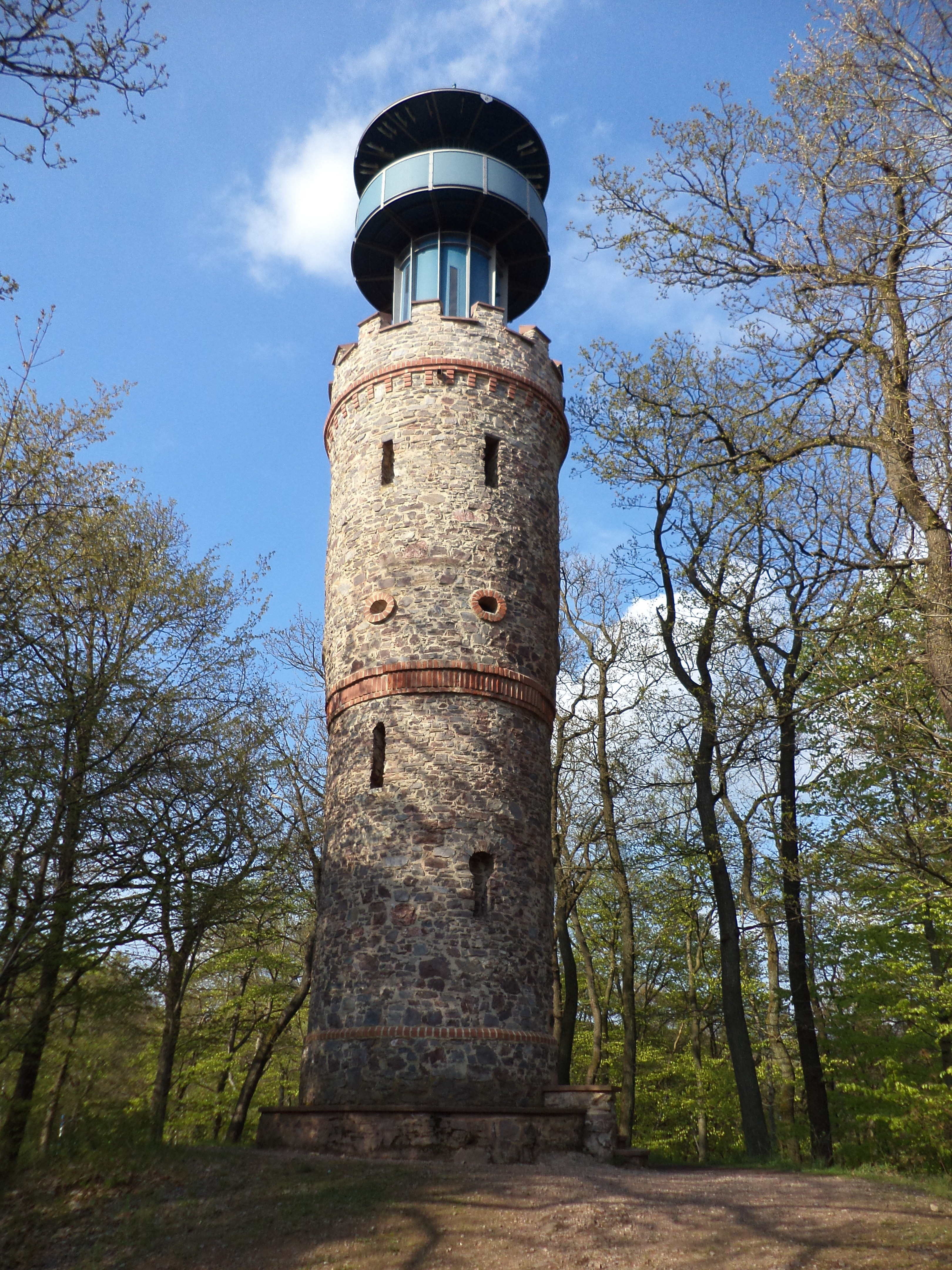 Der Ludwigsturm auf dem Gipfel des Hahnenkamms bei Alzenau